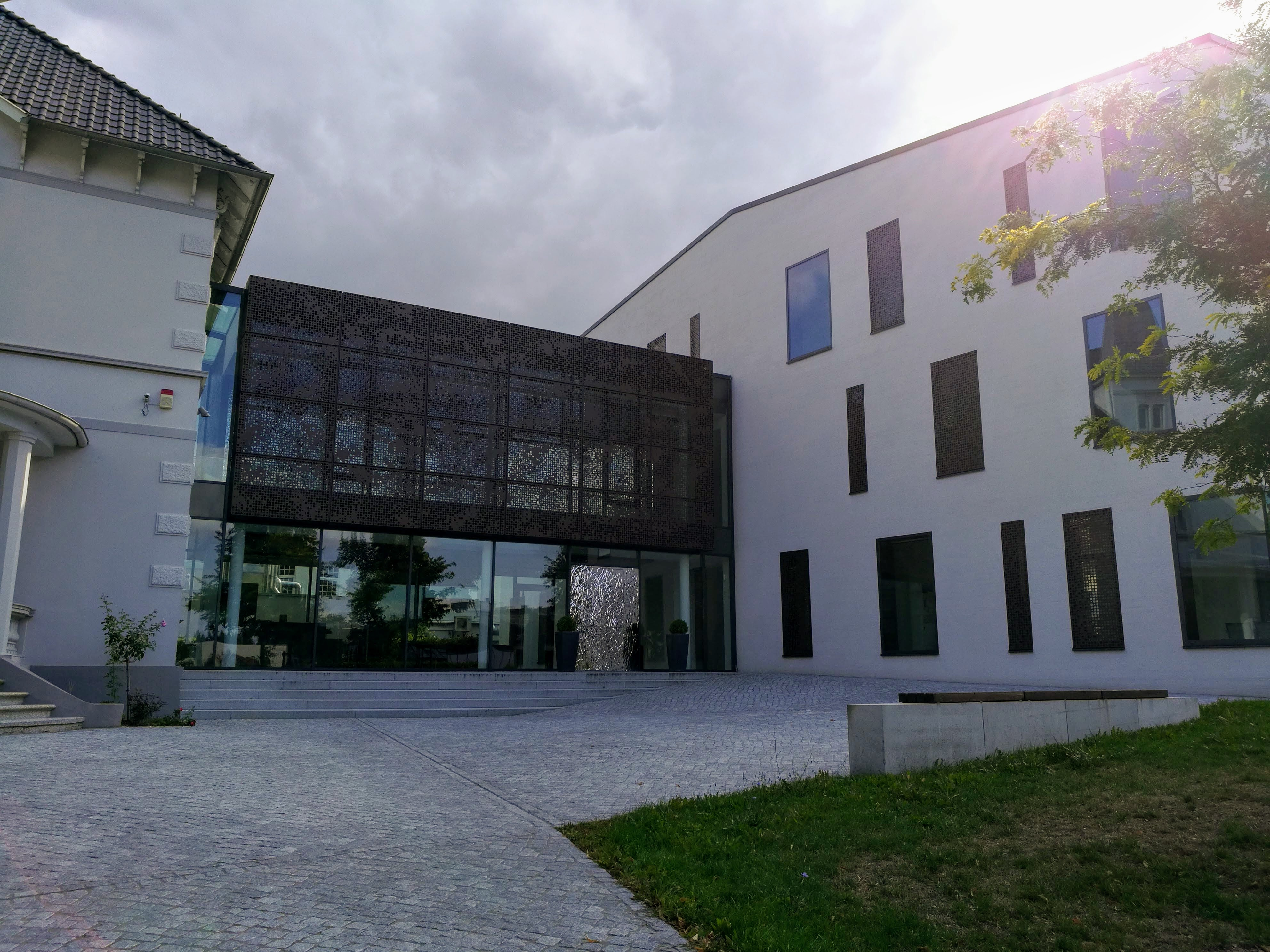 Weinrich Herford Verwaltungsgebäude